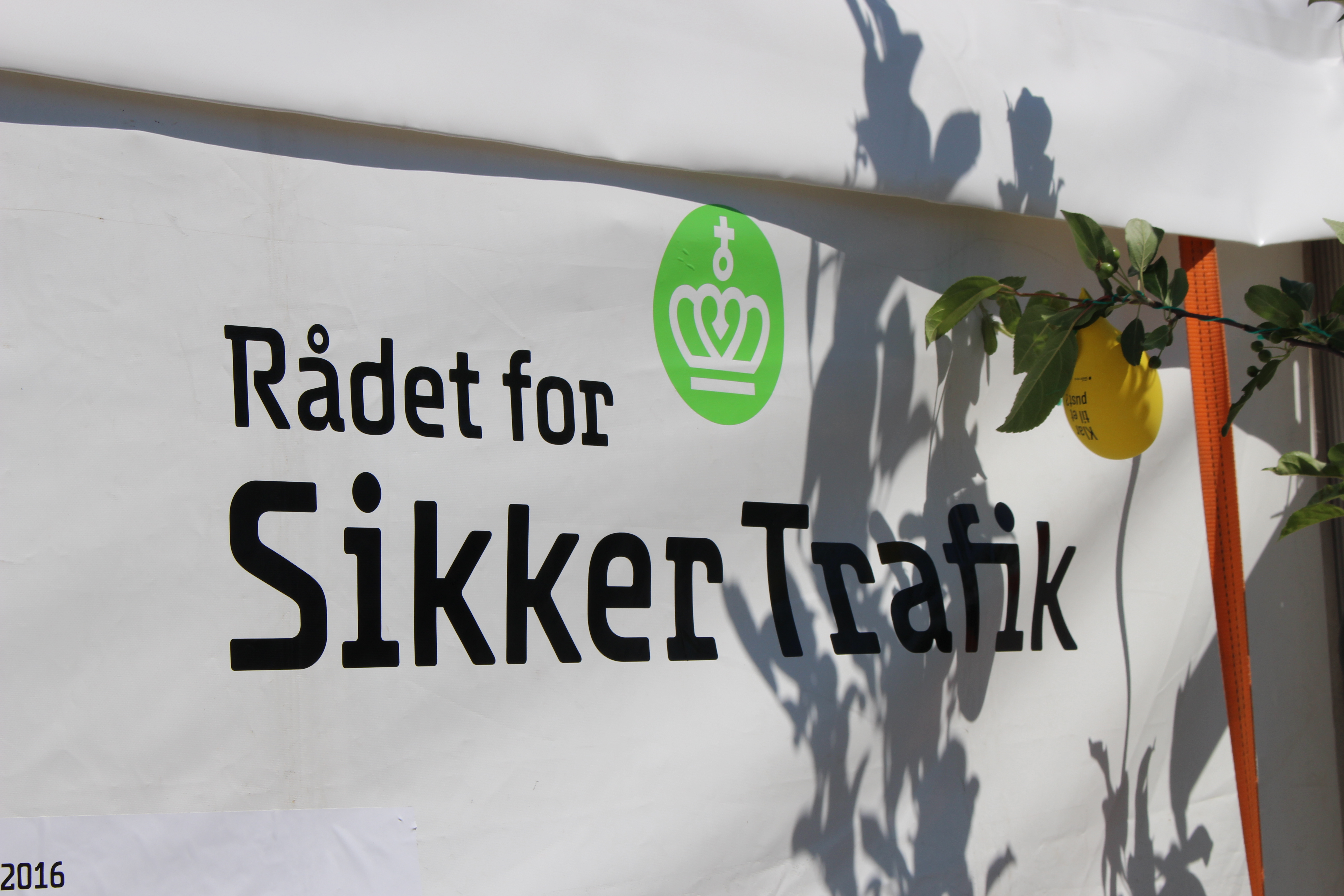 Rådet for Sikker Trafik. Organisationens telt på Folkemødet 2016.